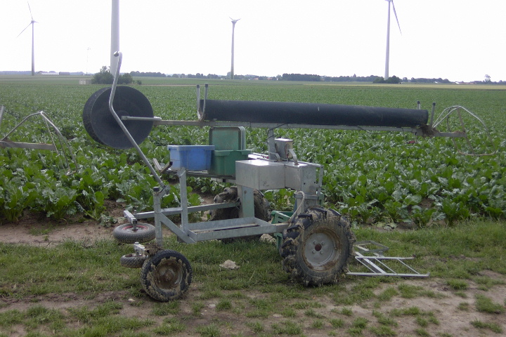 Maschine um Spargelkisten zu transportieren und die Folie vom Spargelfeld anzuheben, sodass darunter gestochen werden kann